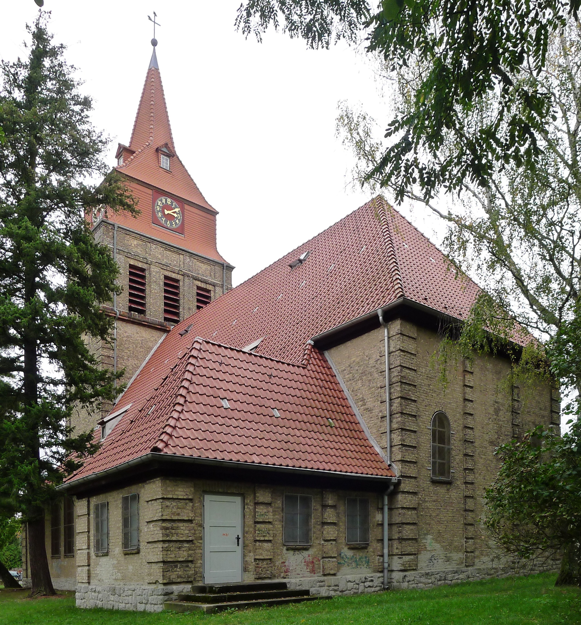 Anbau für die Sakristei